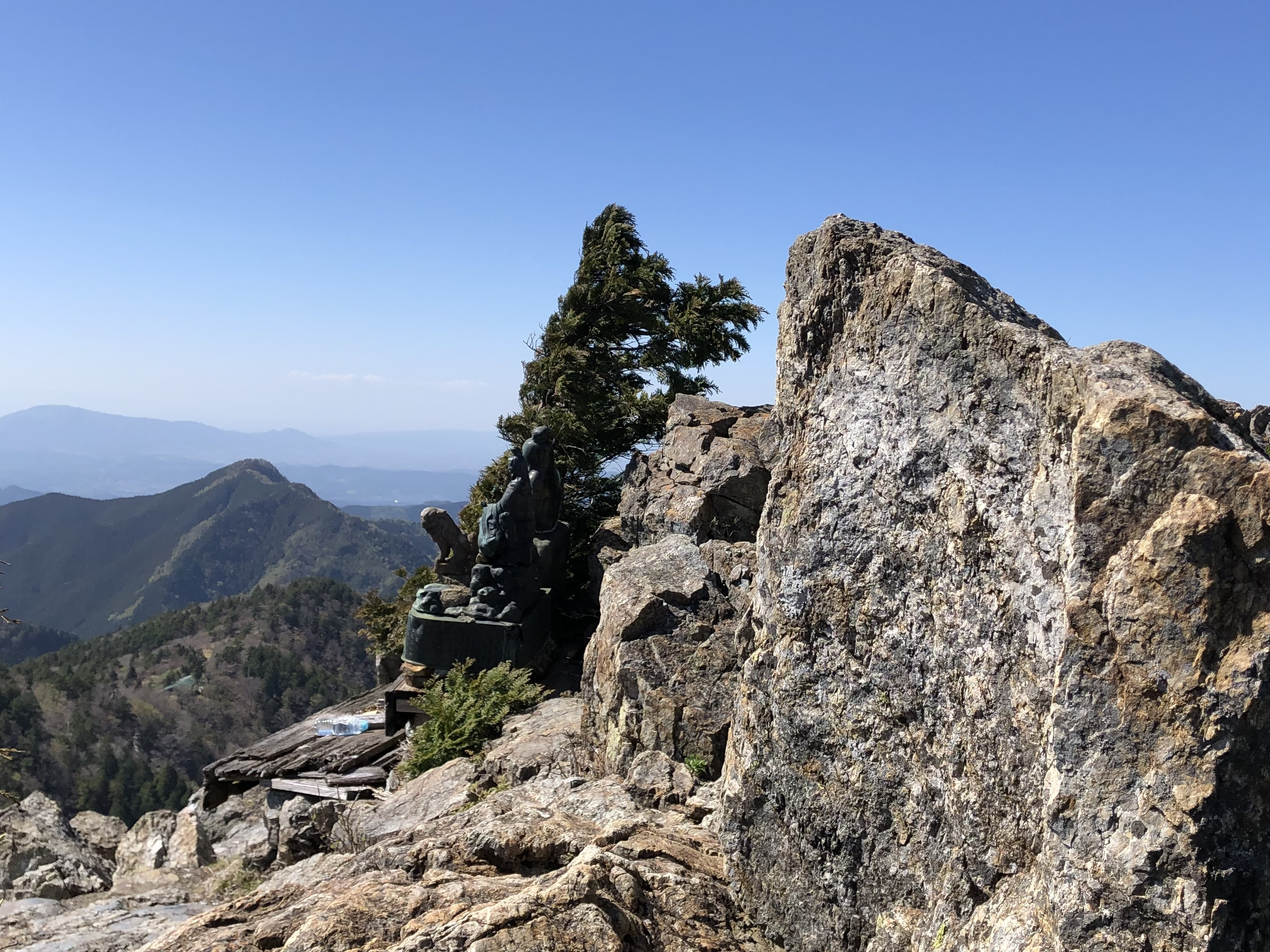 鐘掛岩の頂上。